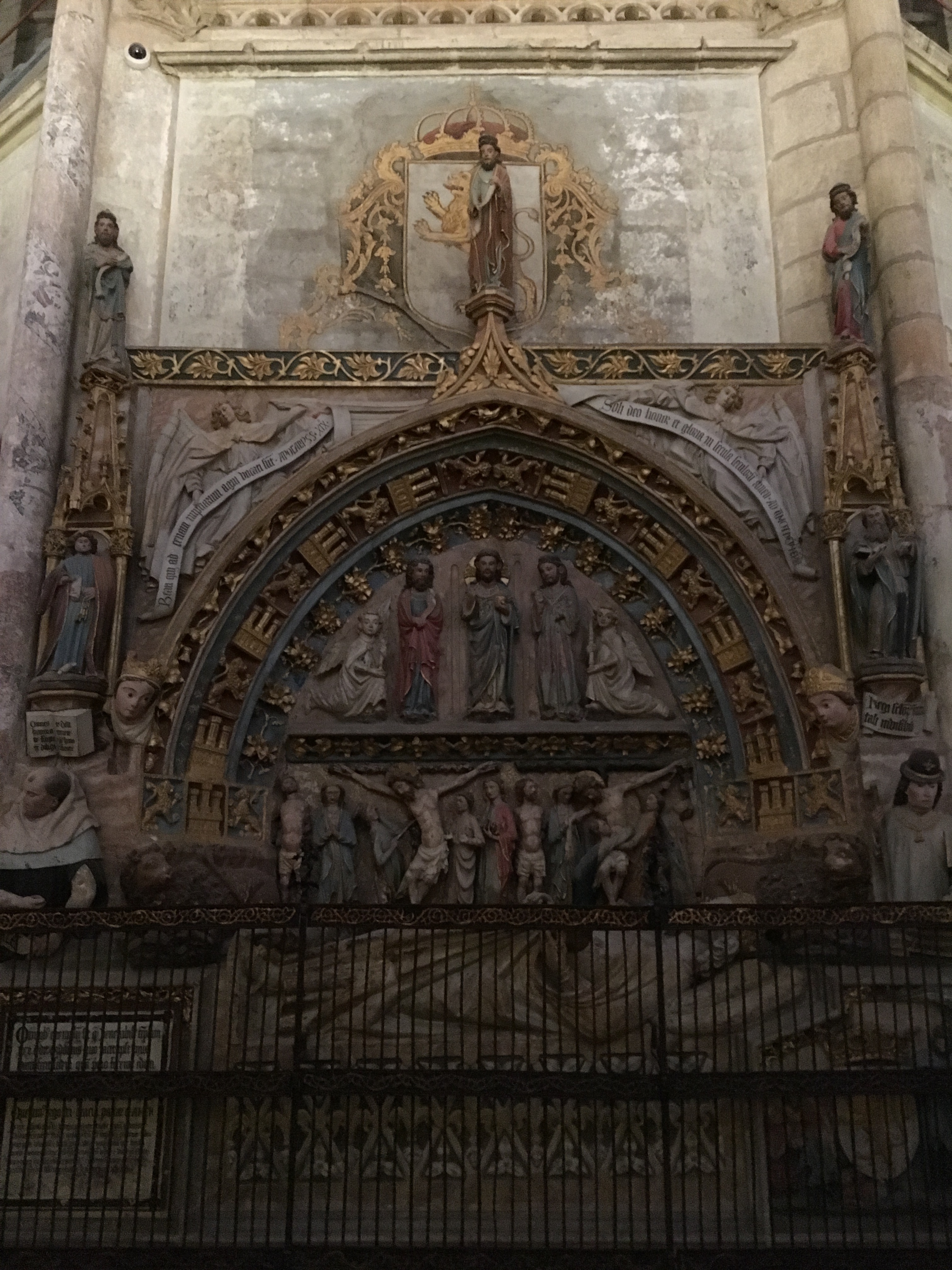 Catedral de León. Sepulcro de Ordeño II, ss. XIII-XV.